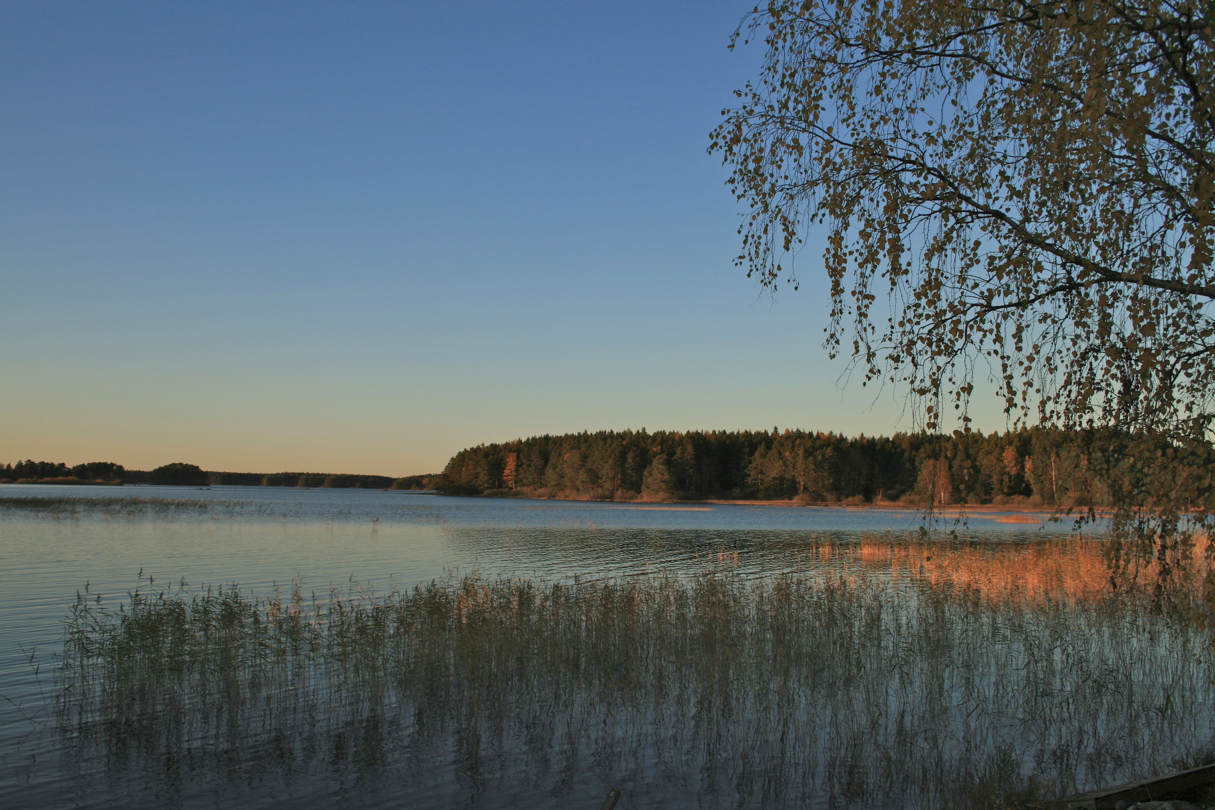 View from Skekarsbo, Färnebofjärden national park